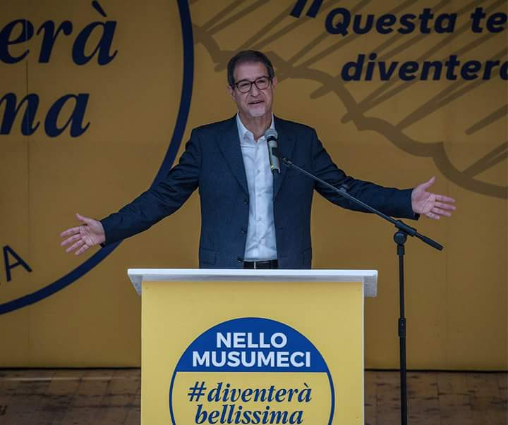 Nello Musumeci apre la campagna elettorale del movimento "Diventerà Bellissima" durante le regionali siciliane del 2017